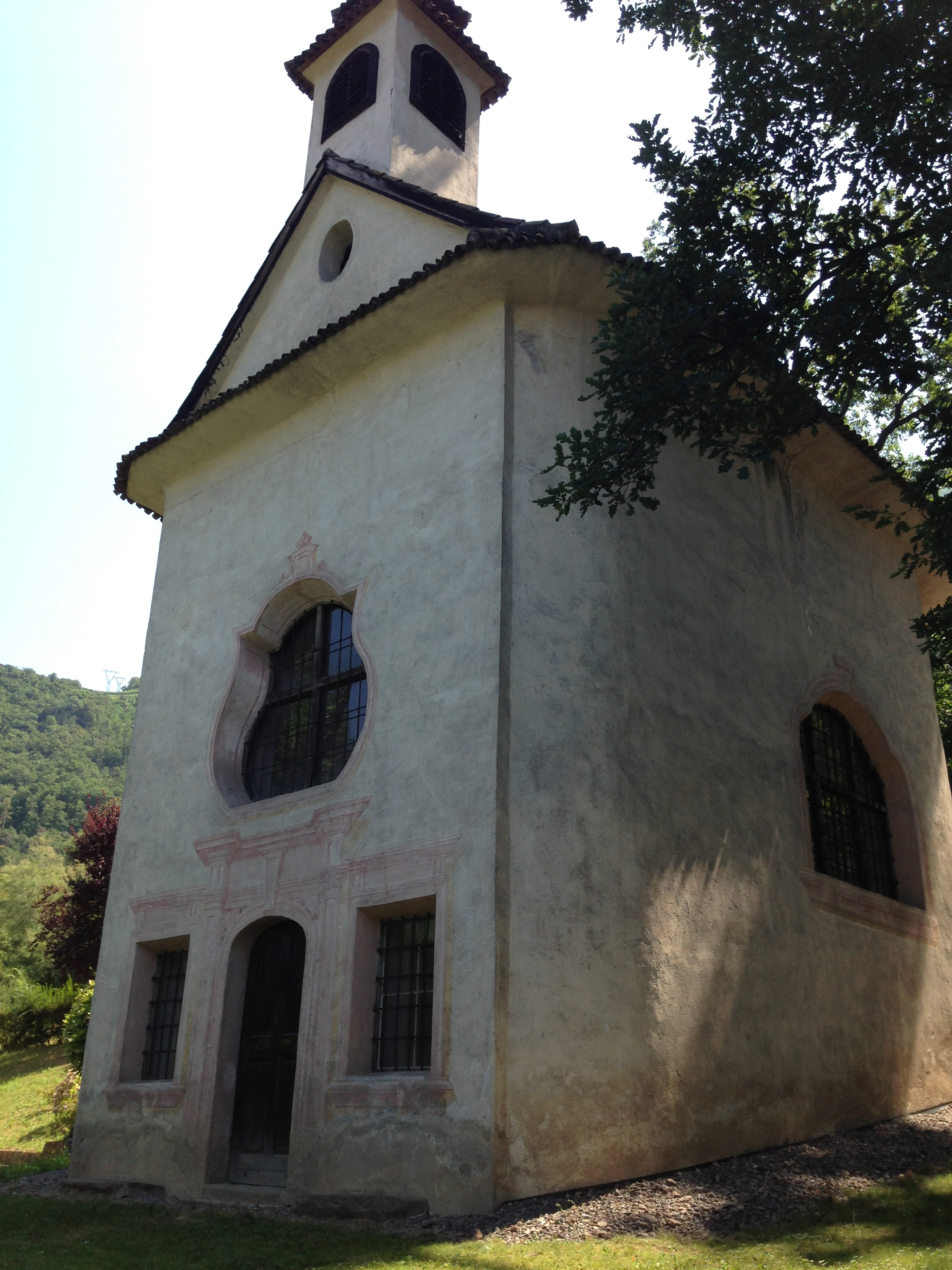 St. Gertraud in Haslach (Bozen, Südtirol)